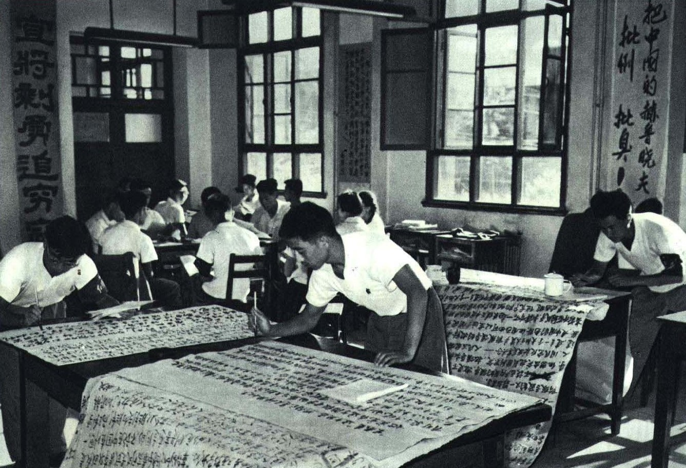 1967-11 1967年 北京师范大学大字报批评刘少奇